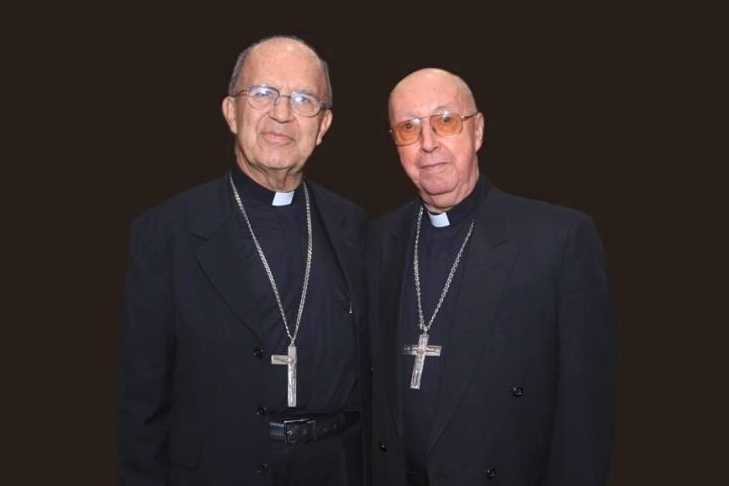 Monseñor Alberto Giraldo Jaramillo y monseñor Hector Rueda Hernandez, arzobispos emeritos de Medellín